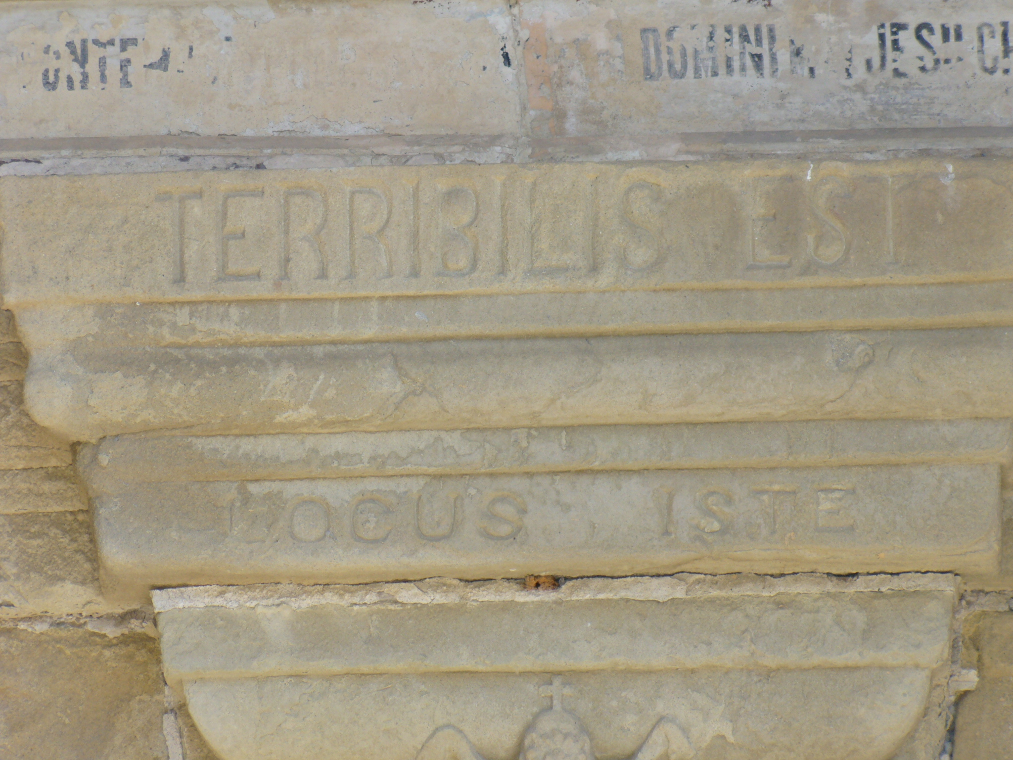 Inschrift am Eingang der Kirche in Rennes-le-Chateau